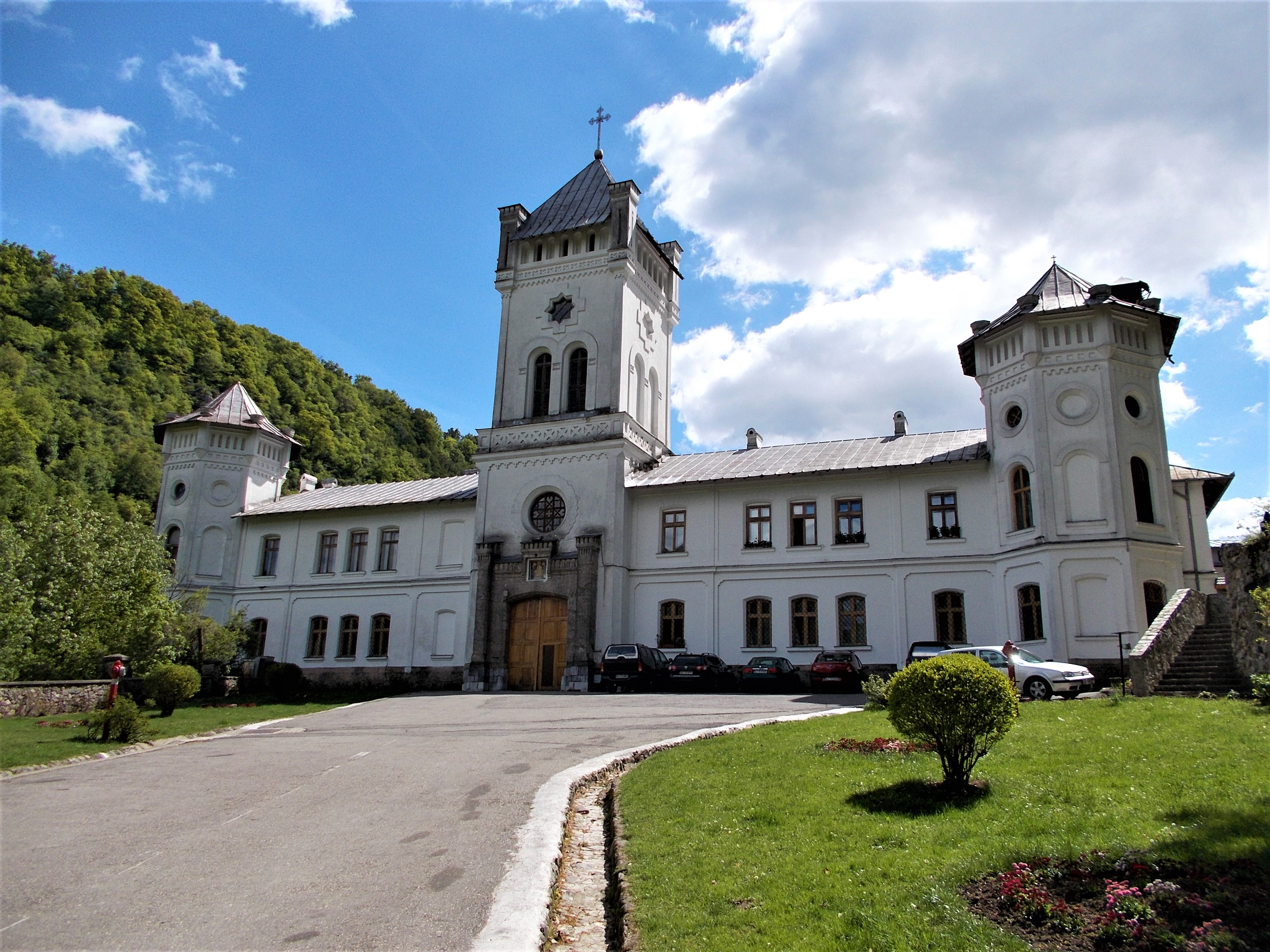 Mănăstirea Tismana - Turnul clopotniță 03